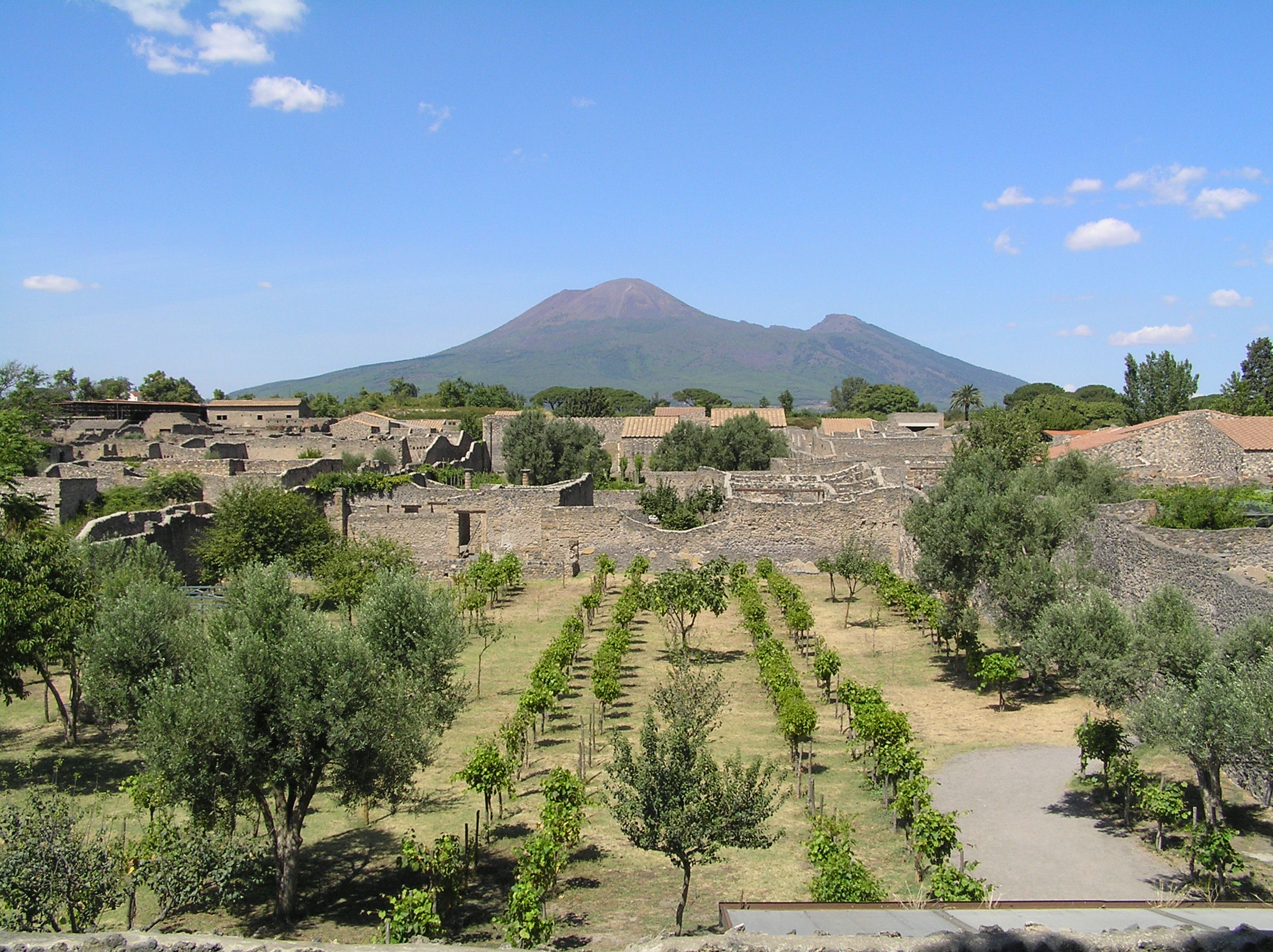 Blick auf die einst verschüttete Stadt Pompeji mit Blick auf den Vesuv. Im Vordergrund der Garten der Flüchtlinge.